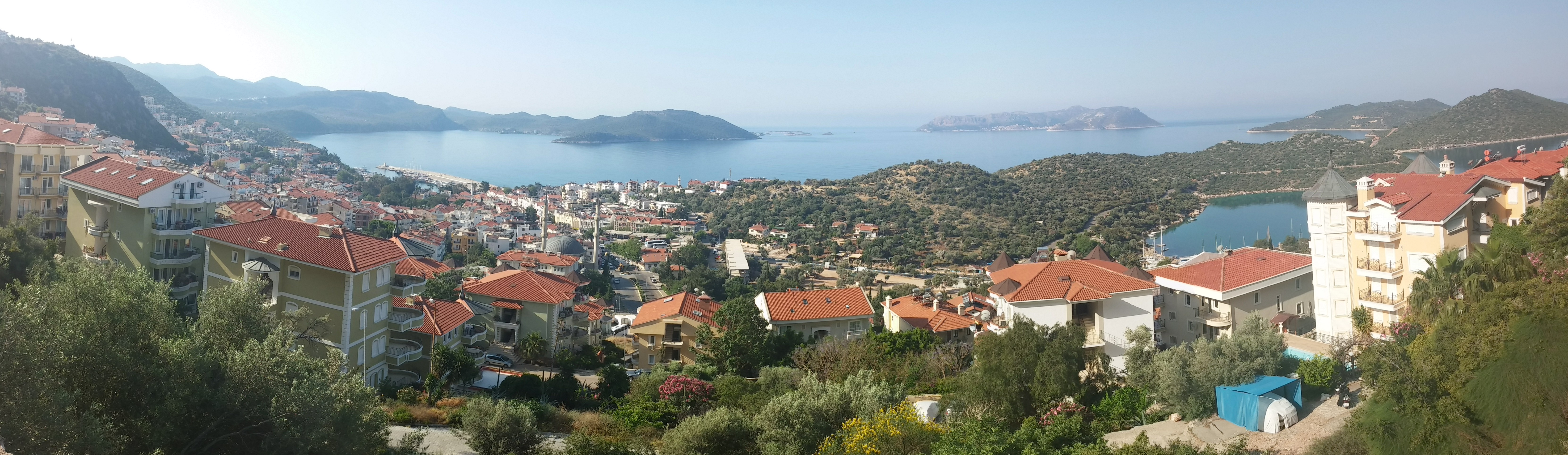 Kaş'ın panoramik görünümü.